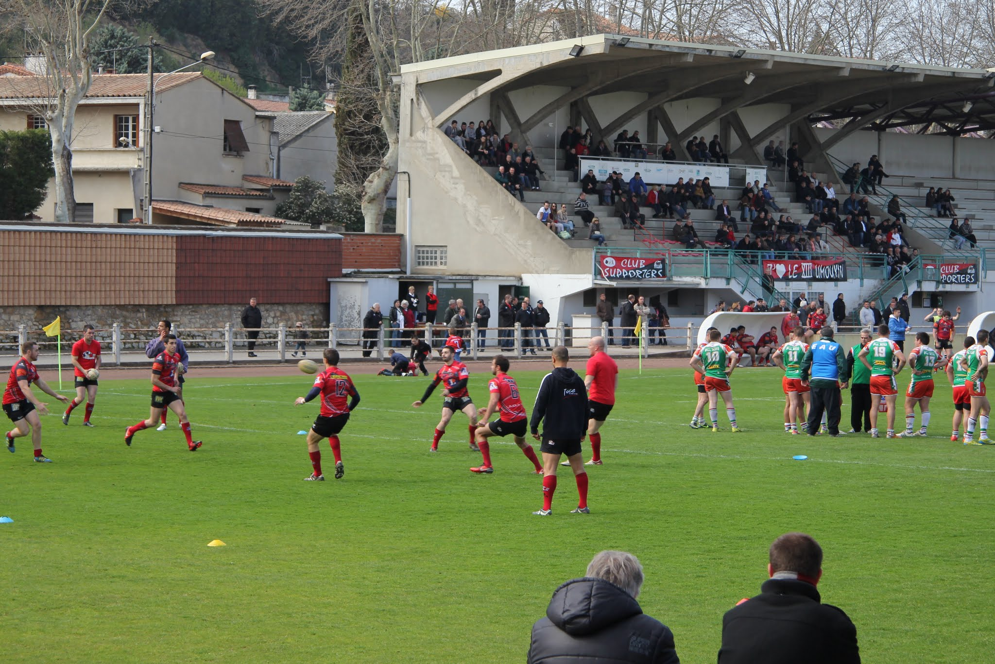 Stade de l'Aiguille à Limoux où joue le XIII Limouxin